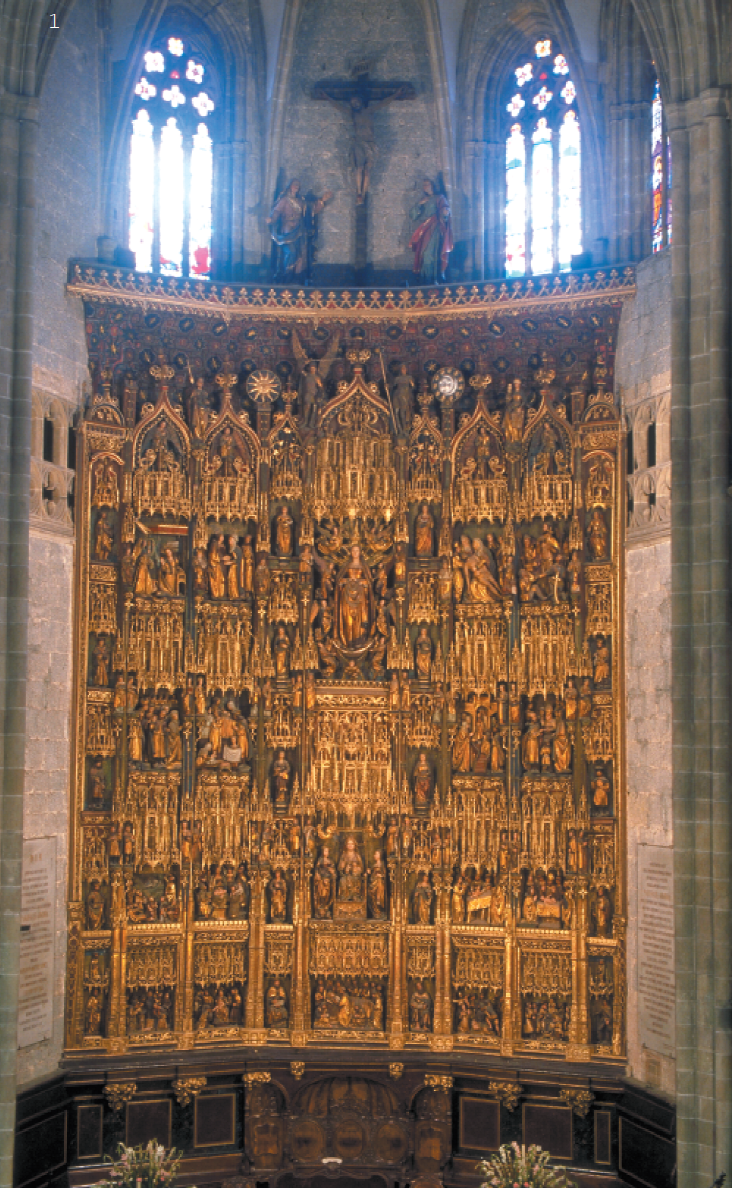 Lekeitiko Santa Mariako erretaula